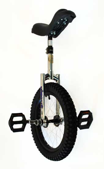 Ethjulet cykel